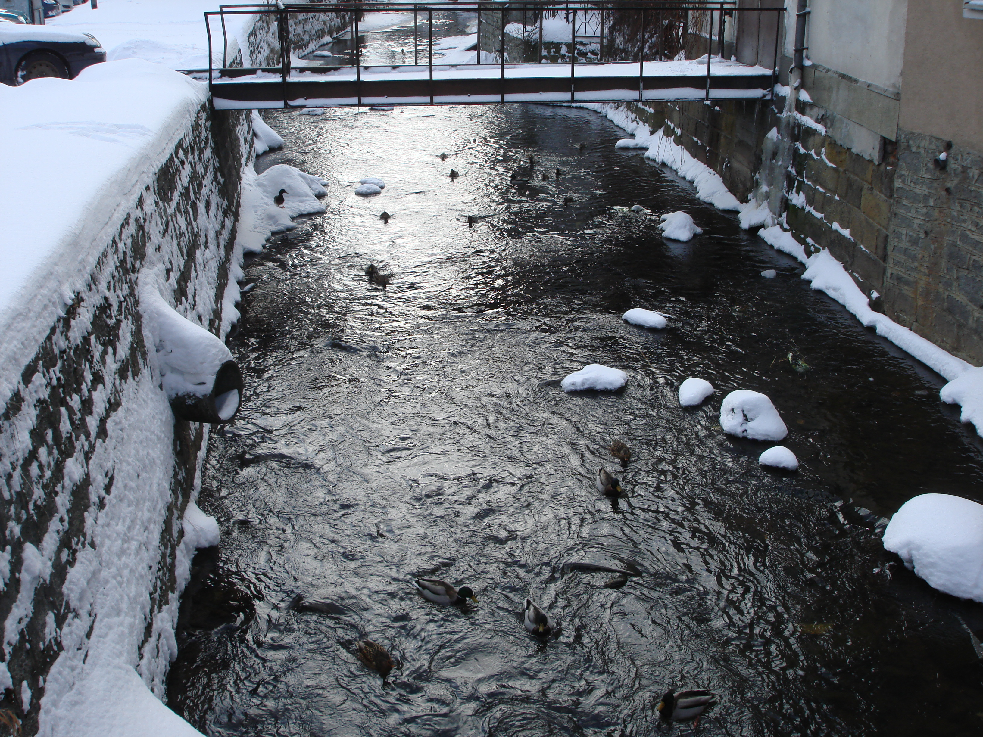 Kamienna Góra, Zadrna zimą